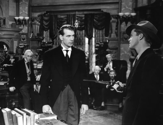 1941年製作の映画「教授と美女」の広告用写真。ゲイリー・クーパーに銃を向けるダン・デュリエ